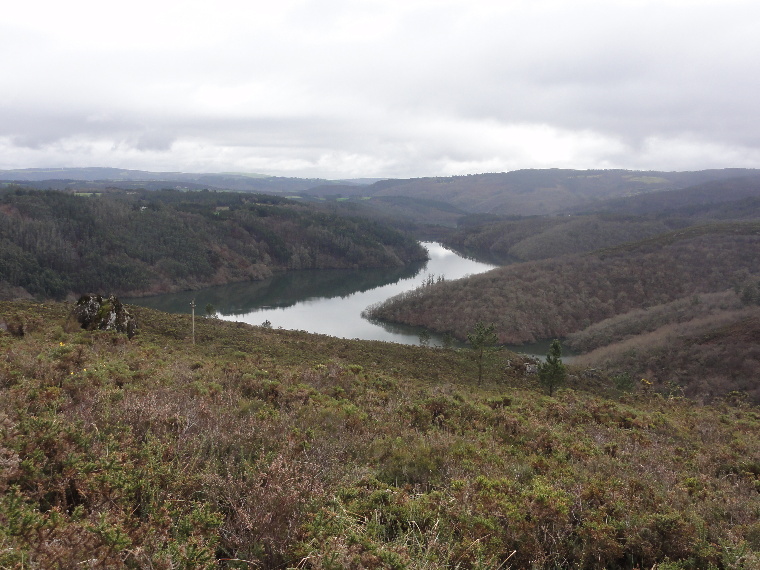 Fragas do Eume This is a photography of a Special Area of Conservation in Spain with the ID: ES1110003. Natura2000 entry, EEA entry